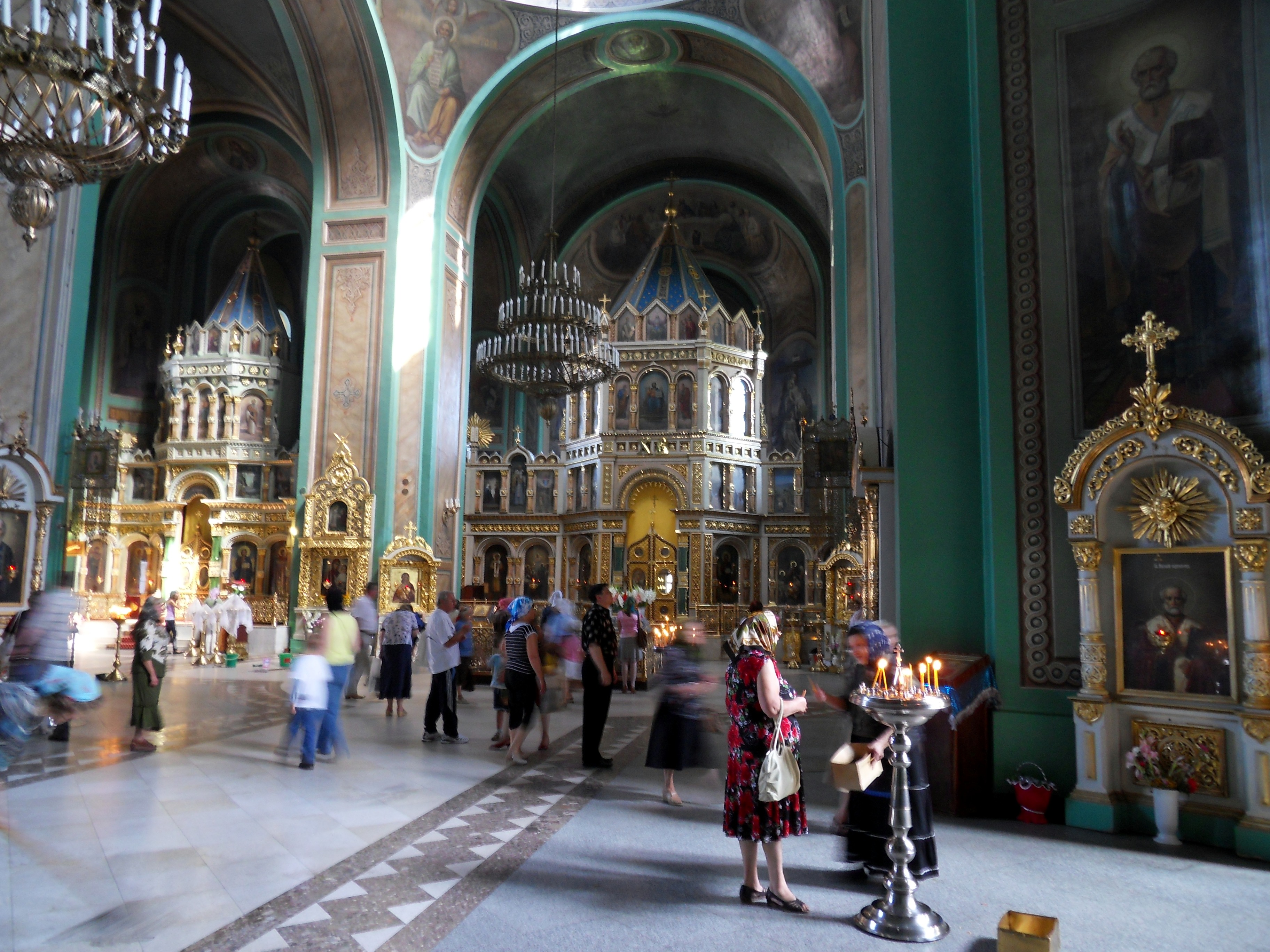 W kafedralnej cerkwi